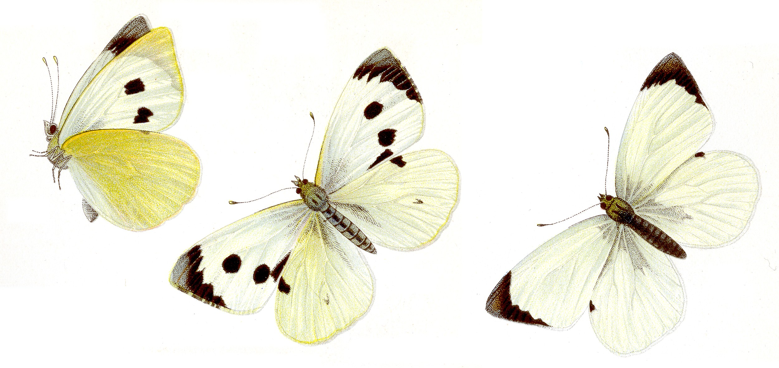 Großer Kohlweißling - Pieris brassicae, ♂ und ♀